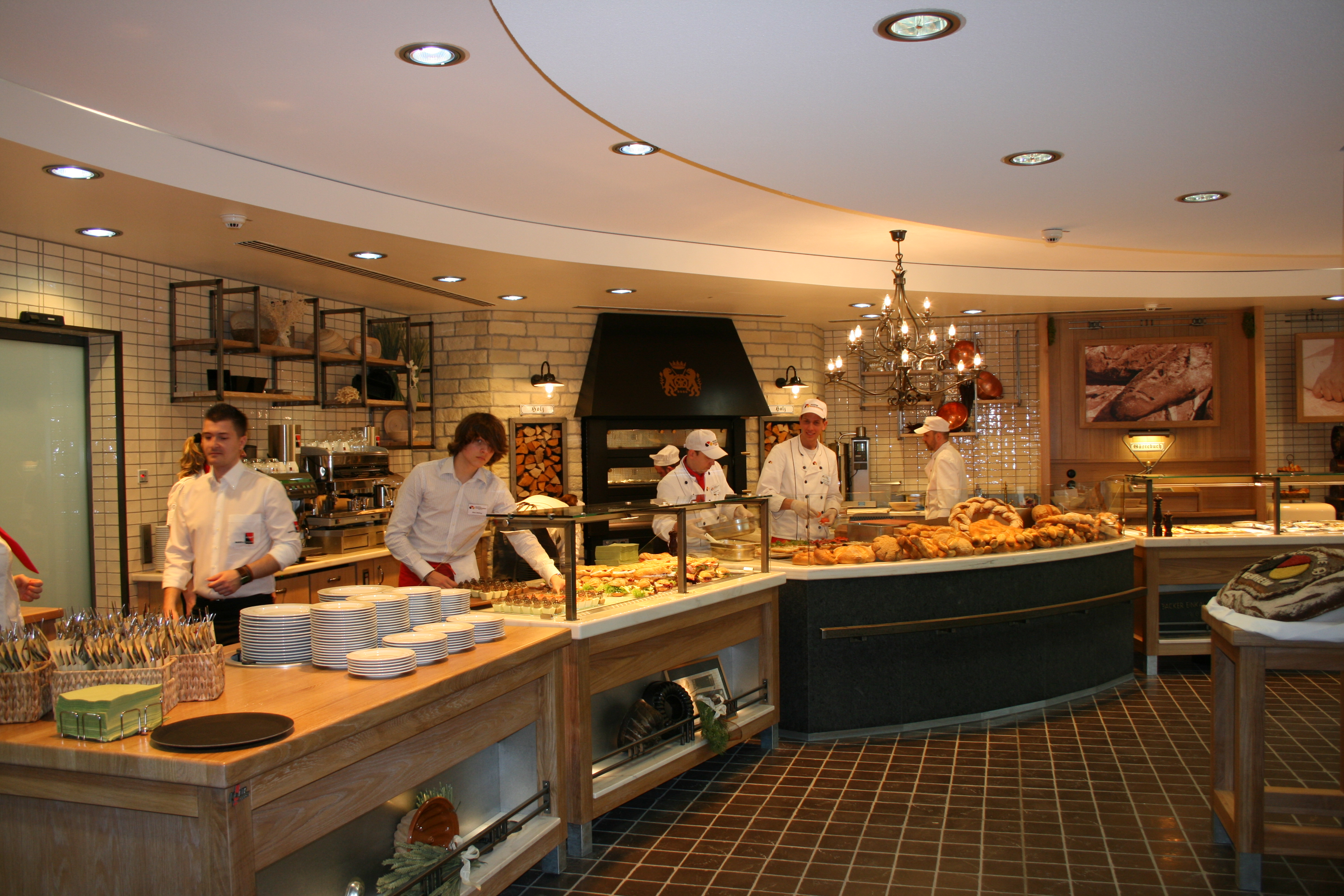 Bäckergastro-Trainingsbereich der Bäcker-Bundesakademie in Weinheim